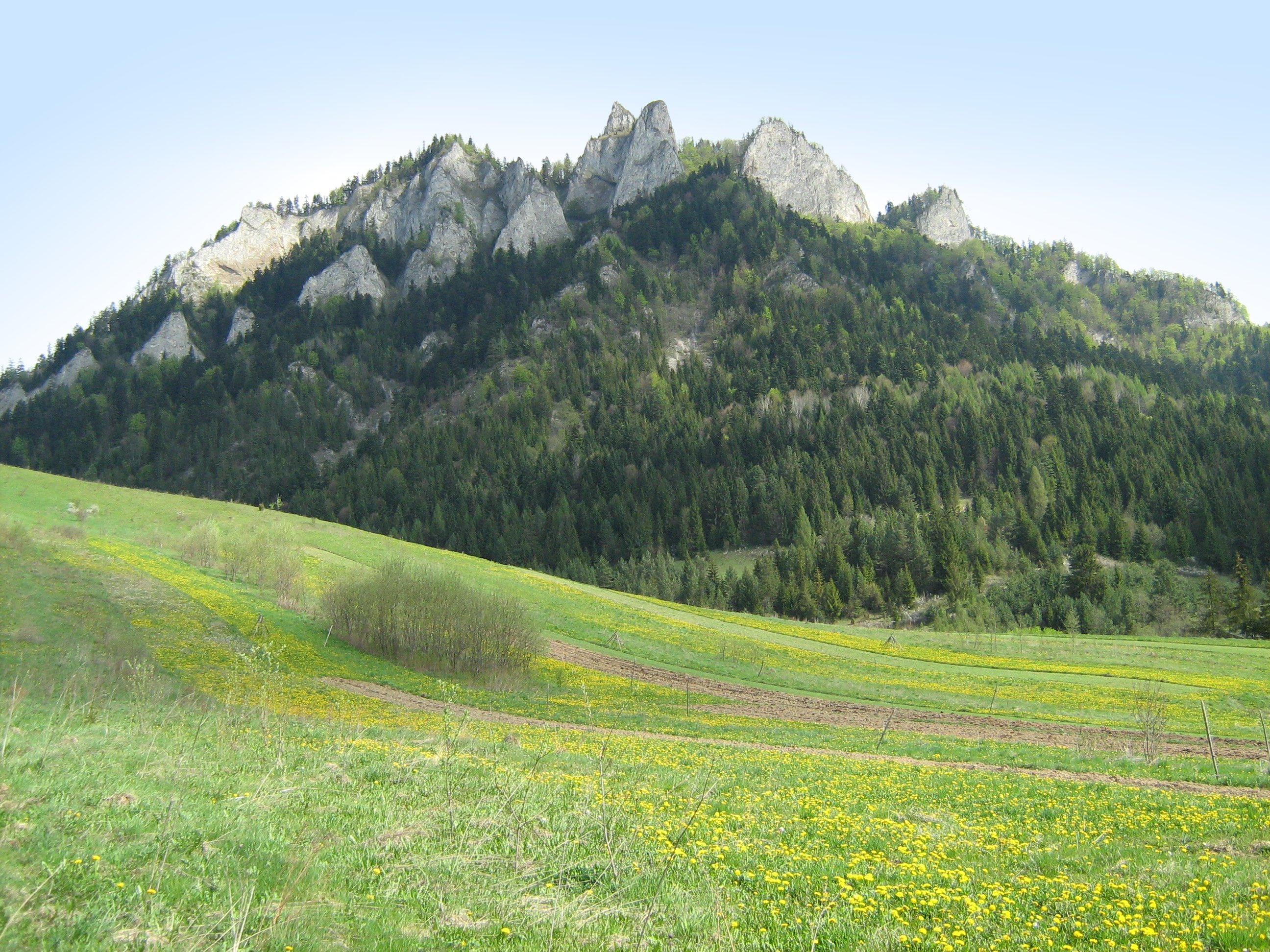 Trzy Korony (widok ze Sromowców Niżnych)